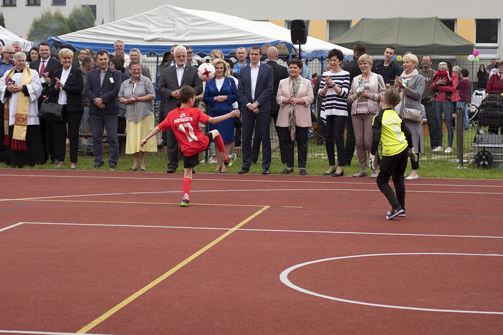 Przecieszyn (powiat oświęcimski), Małopolska. Premier Beata Szydło wzięła udział w uroczystym otwarciu wielofunkcyjnego boiska sportowego.